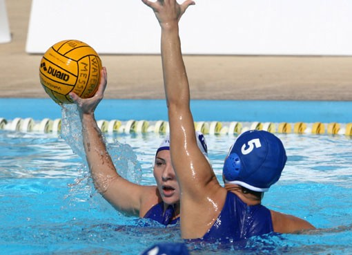 Dettaglio giocatrici della Waterpolo Fontalba Messina e del Bogliasco durante Messina-Bogliasco. Foto scattata a Messina